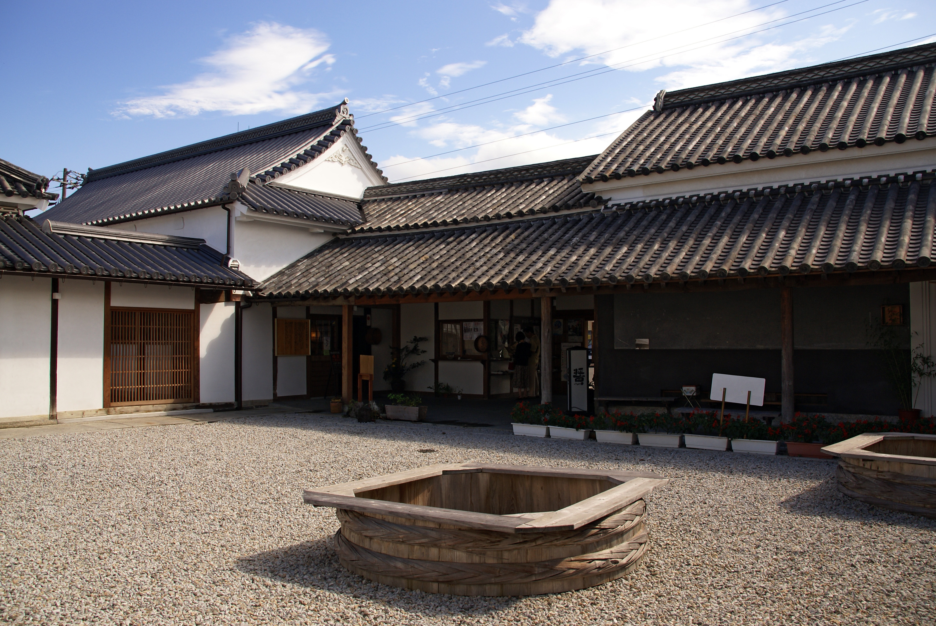 Sanshu Idutsu-yashiki in Hiketa, Higashikagawa, Kagawa prefecture, Japan